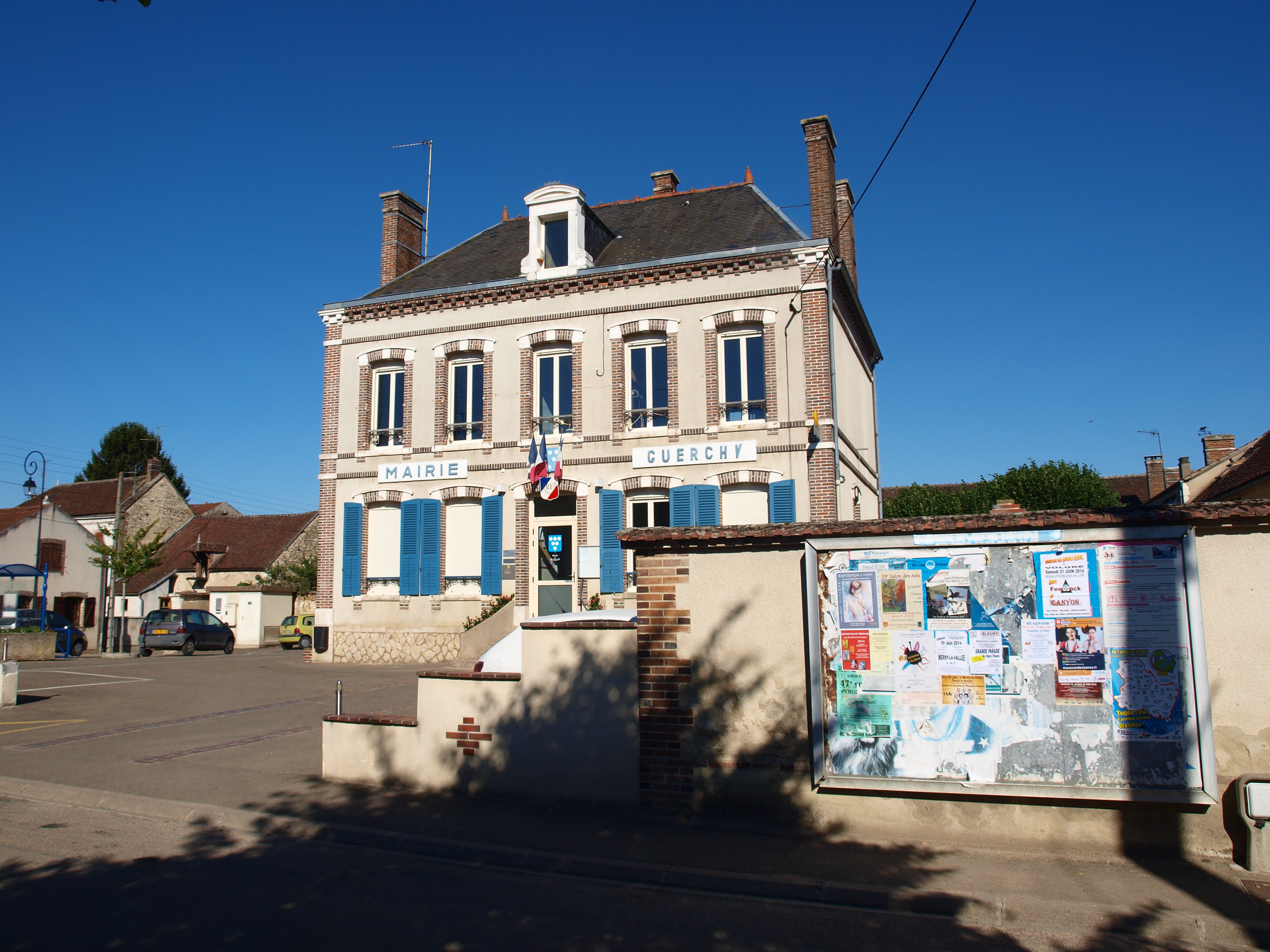 Guerchy (Yonne, France)